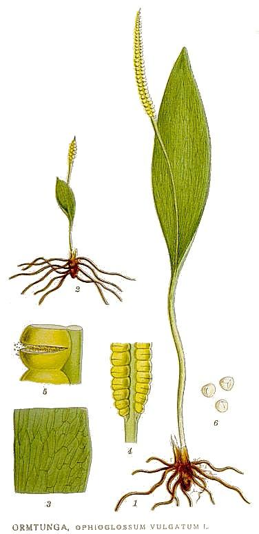 Original Description Ormtunga, Ophioglossum vulgatum L.